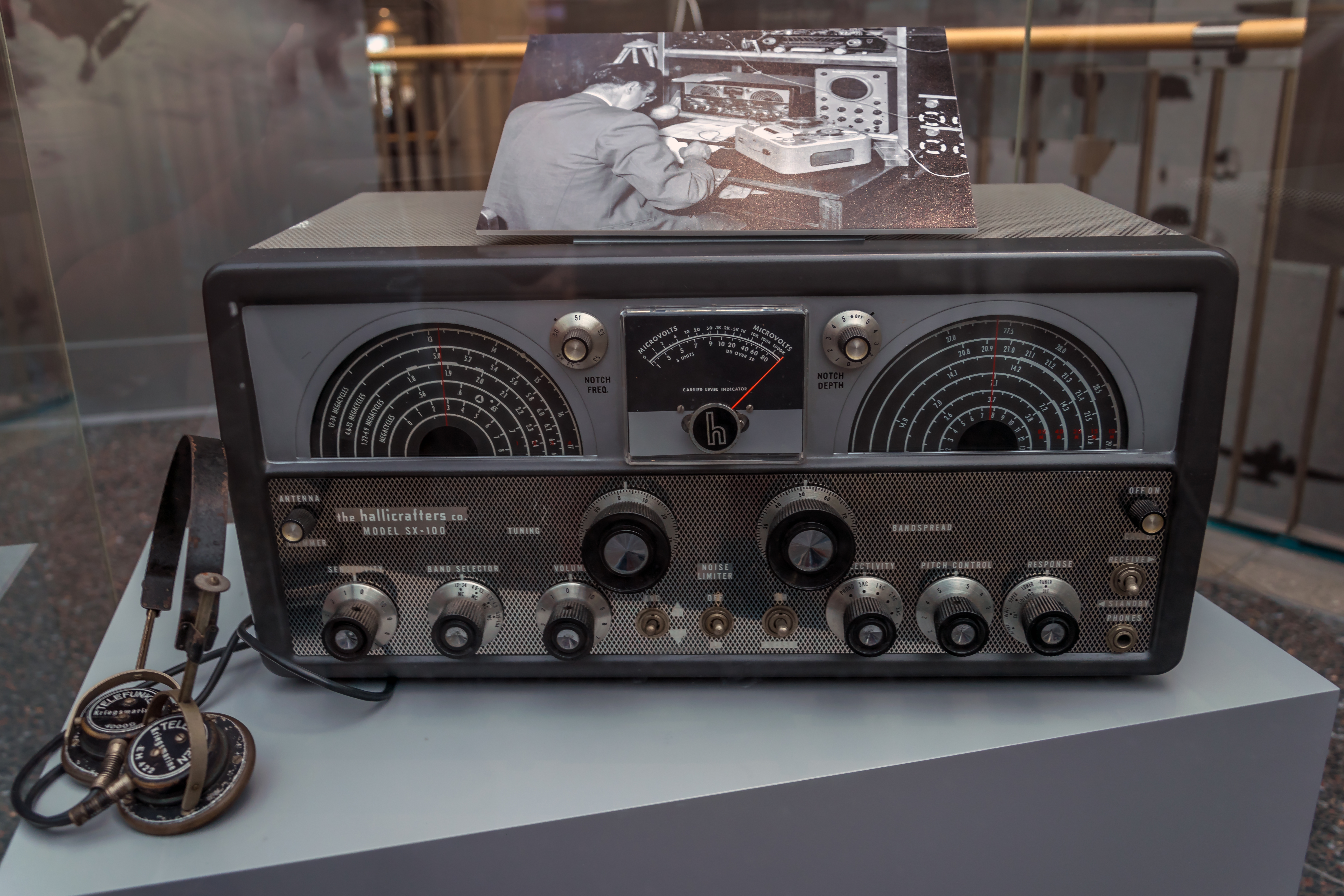 Funkempfangsstation mit der Heinz Kaminski als erster westlicher Forscher in Bochum die Signale des sowjetischen Satelliten Sputnik 1 empfangen hat. Ausgestellt im Haus der Geschichte in Bonn